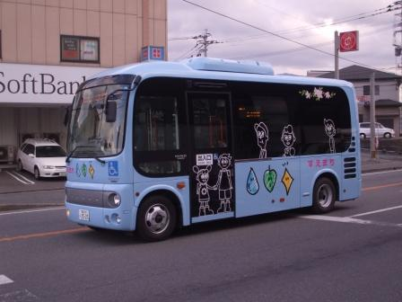 須恵町コミュニティバスの画像である